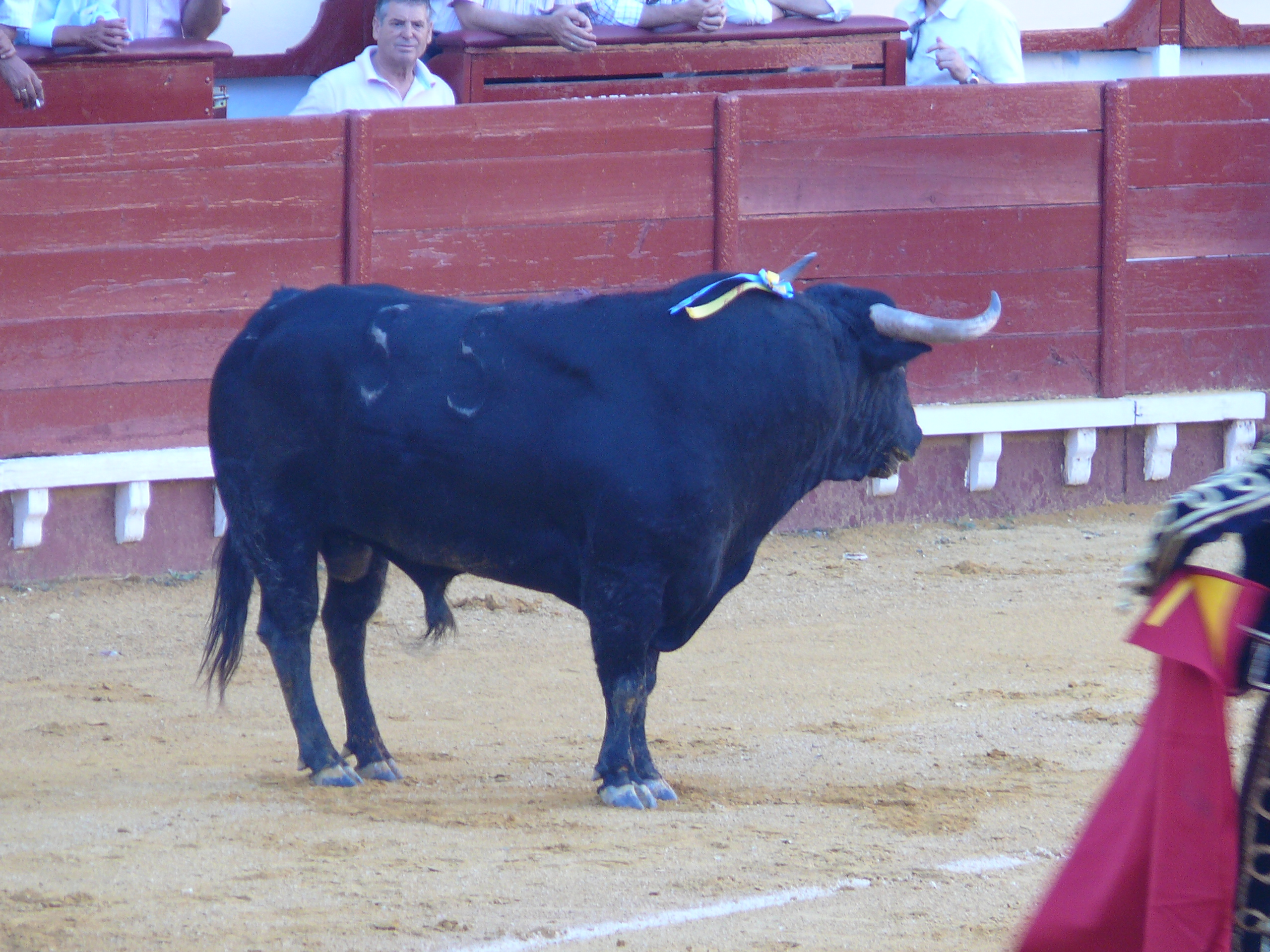 Toro con el nombre de Insensato de la Ganadería del Marqués de Domecq, indultado por Pepín Liria en El Puerto de Santa María el 15 de Agosto de 2008 en la corrida goyesca.